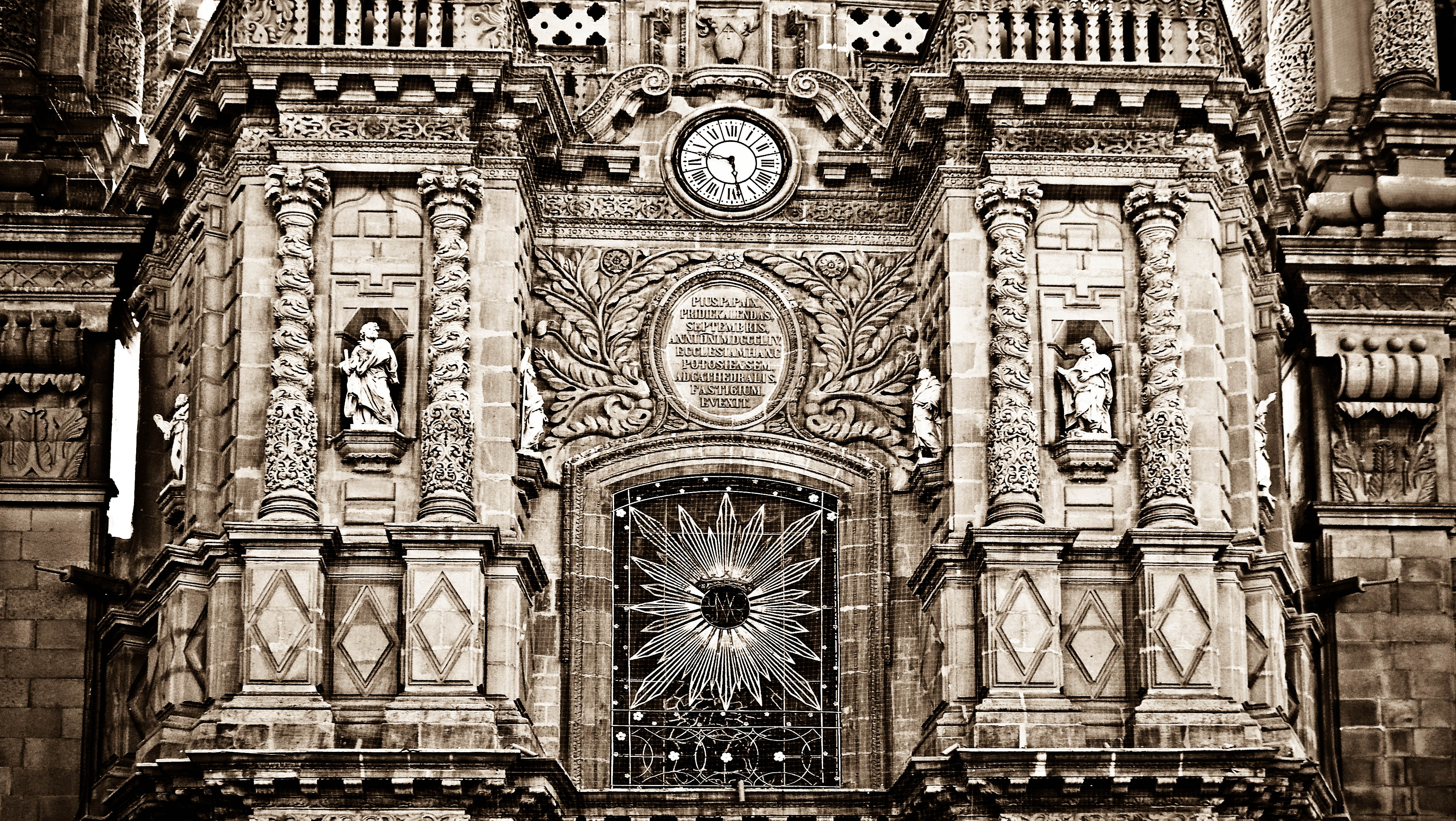 Catedral Metropolitana de San Luis Potosí